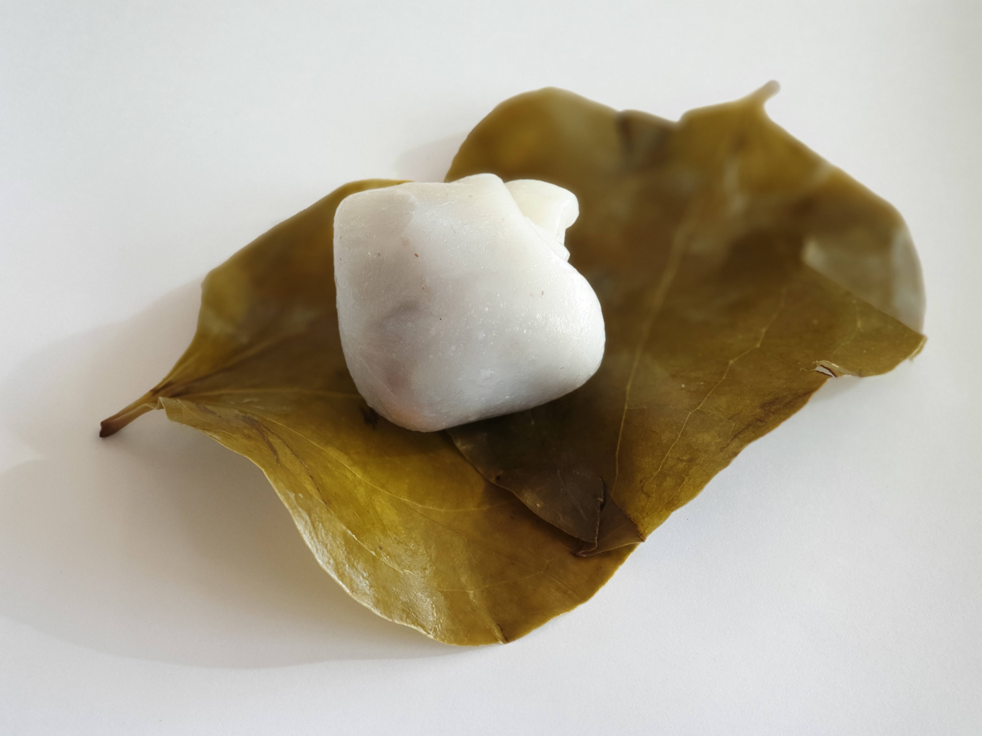 망개떡